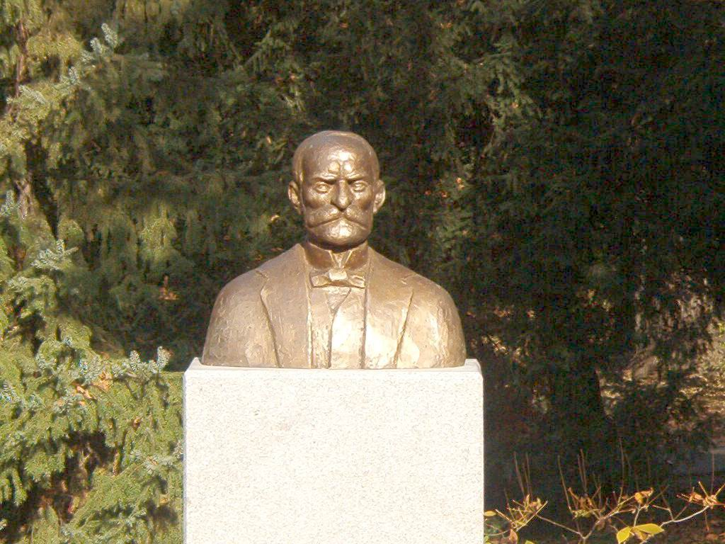 Јосиф Панчић, попрсје у Ботаничкој Башти Licensing Fotografisao Goldfinger. U javnoj upotrebi!